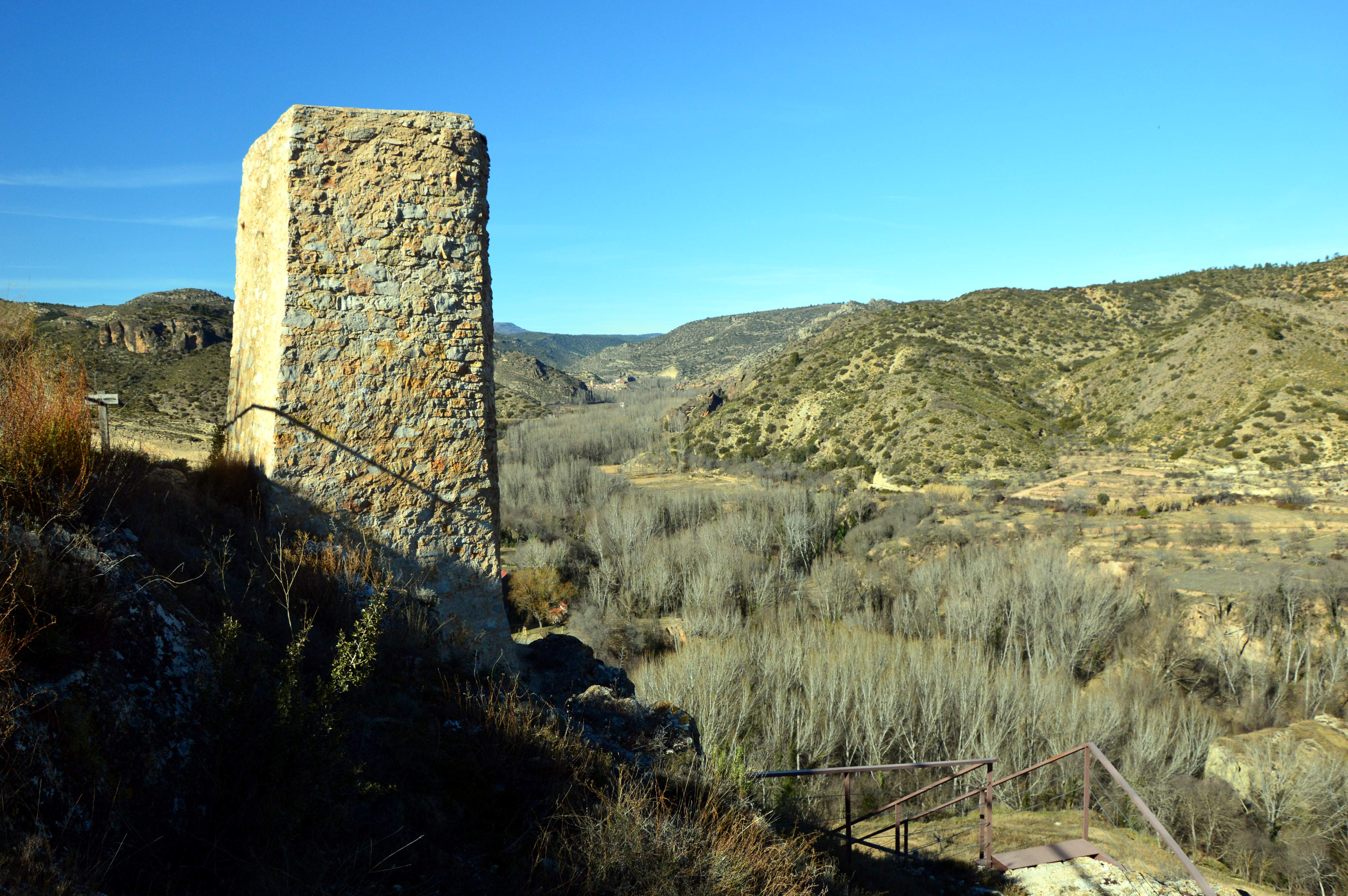 Detalle de la Torre del Hospital, situada en el sector septentrional del recinto amurallado de Castielfabib (Valencia), sobre el valle del Ebrón y la villa de El Cuervo (Teruel), al fondo (2019).